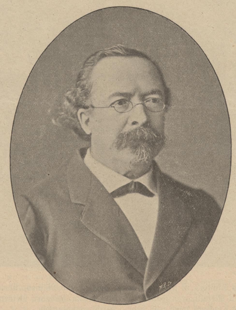 Ferdinand Gottfried von Herder, Professor der Botanik